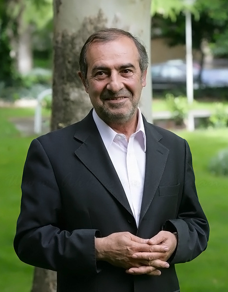 Morteza Alviri